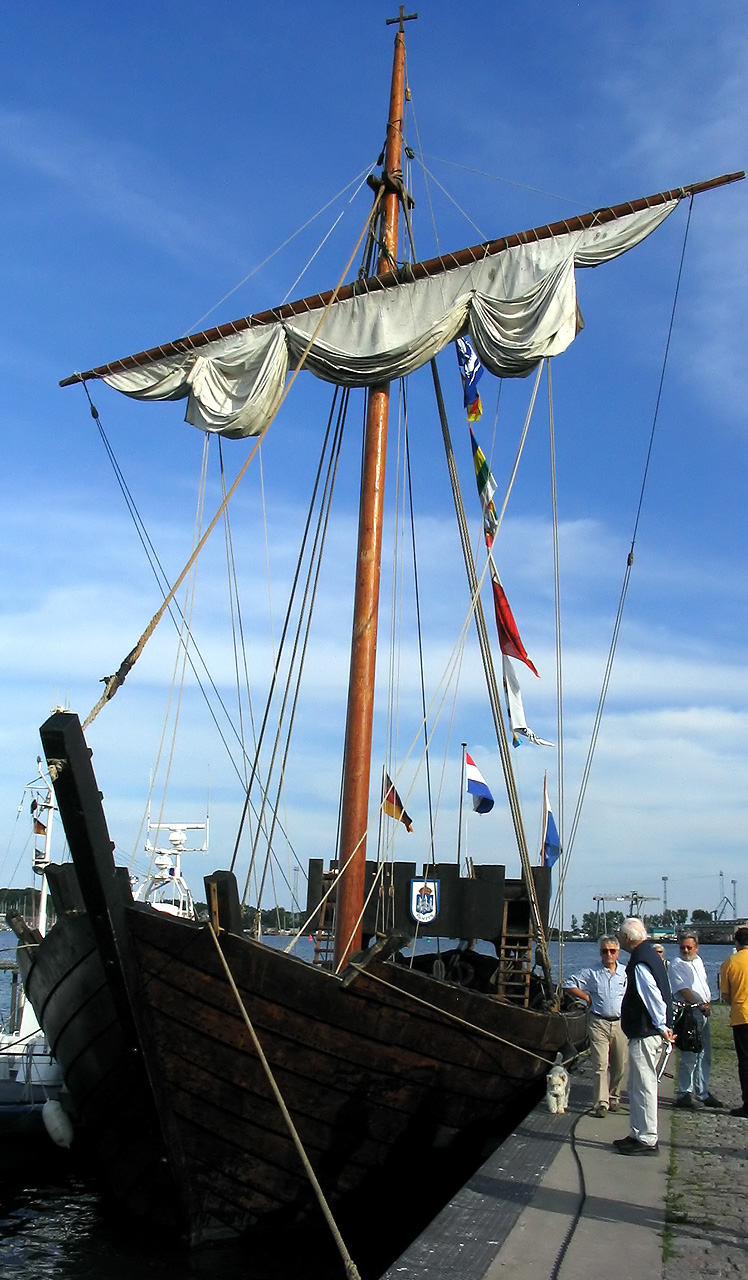 Beschreibung: Kogge Kampen zu Besuch in Stralsund / Cod Kampen visits Stralsund Fotograf: Darkone, 7. Juli 2004